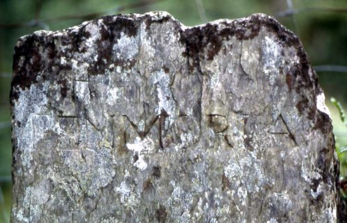 Hen arwydd “Penmorfa” ger gorsaf Tan y Bwlch yn cyfeirio teithwyr o gwmpas, ac nid dros y Traeth Mawr fel heddiw